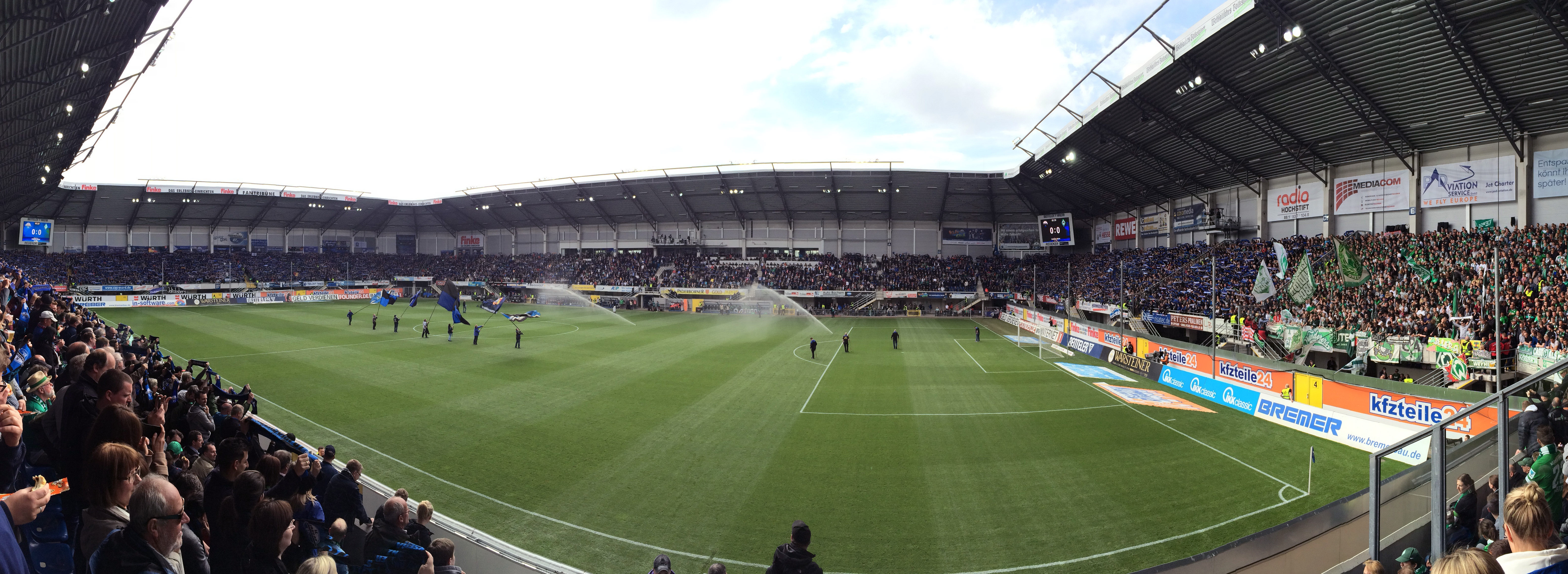 Benteler-Arena; SC Paderborn – Werder Bremen (2:2); 26. April 2015, Bundesliga